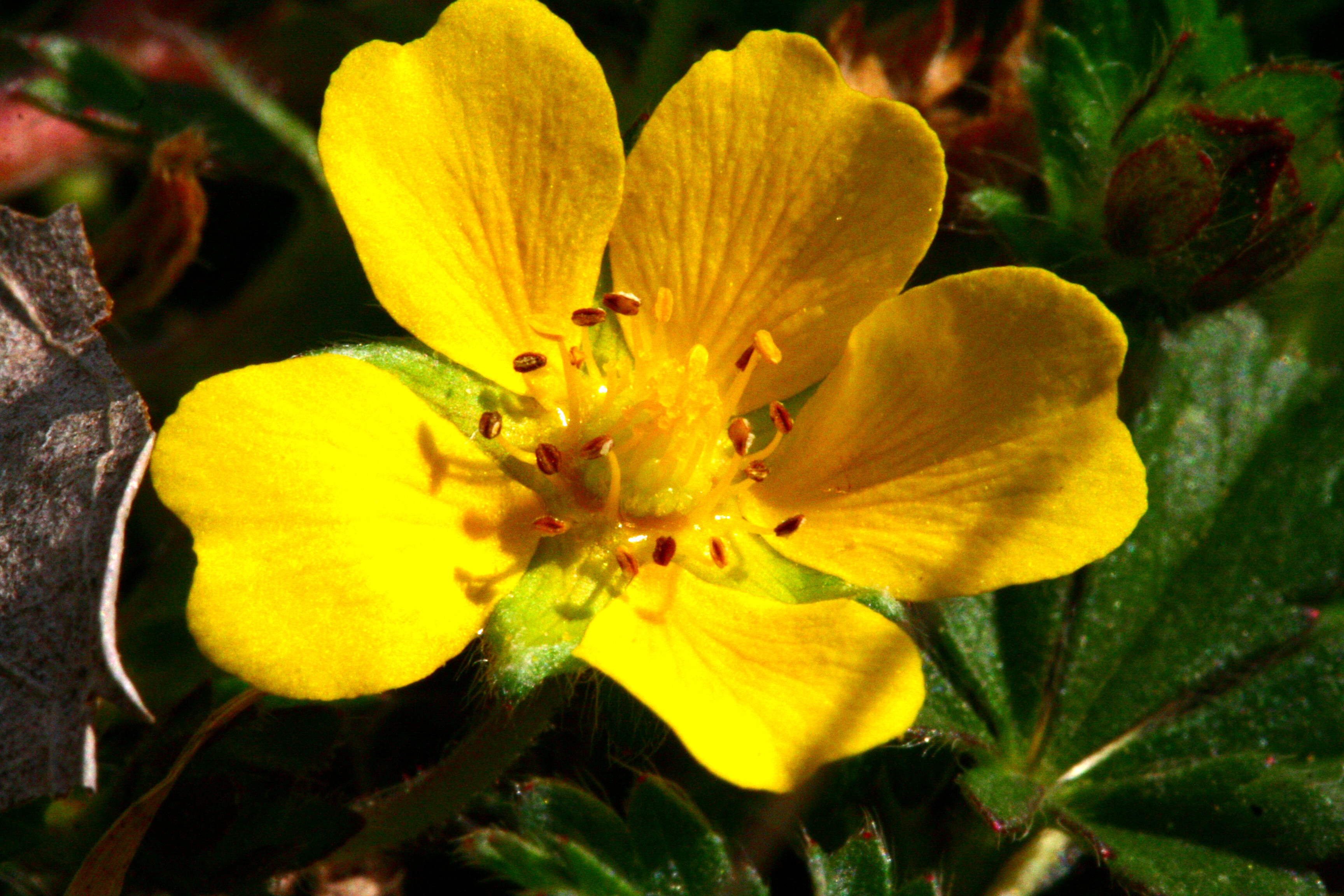 Potentilla_reptans (Cinquefoglia comune) Località Valle di San Lucano (Col di Pra), Taibon Agordino (BL), quota 843 m s.l.m.